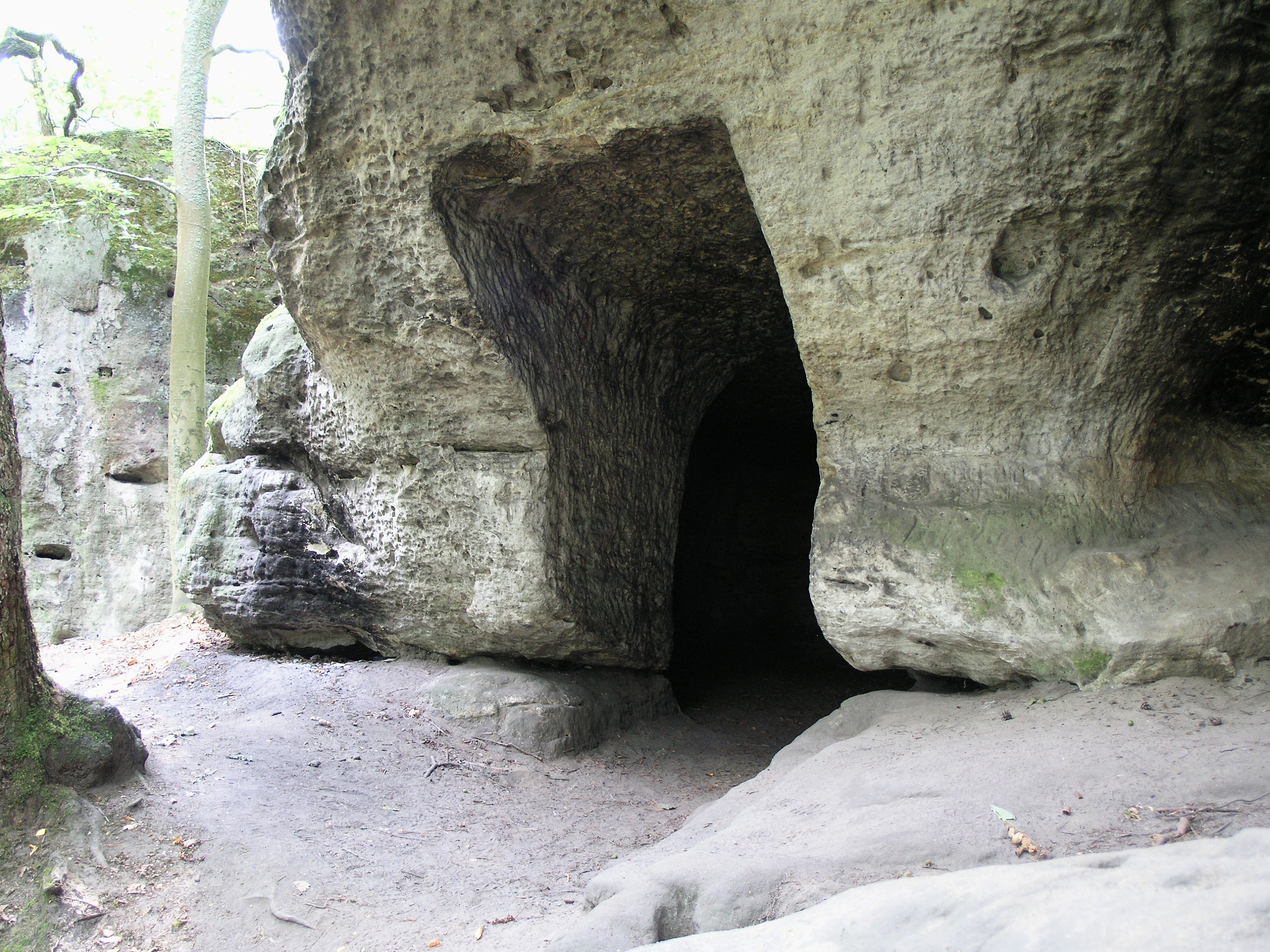 Nedamy - jeskyně Project: Chráněná území.